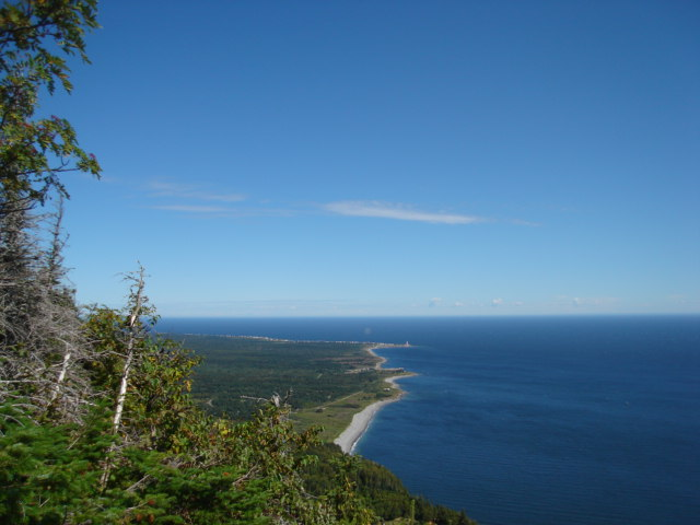 Vue du Fleuve du Saint-Laurent, Parc du Bic